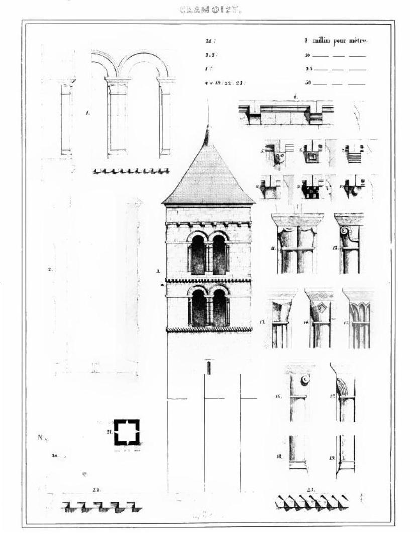 Croquis d'architecture relevés sur place par Eugène Woillez.